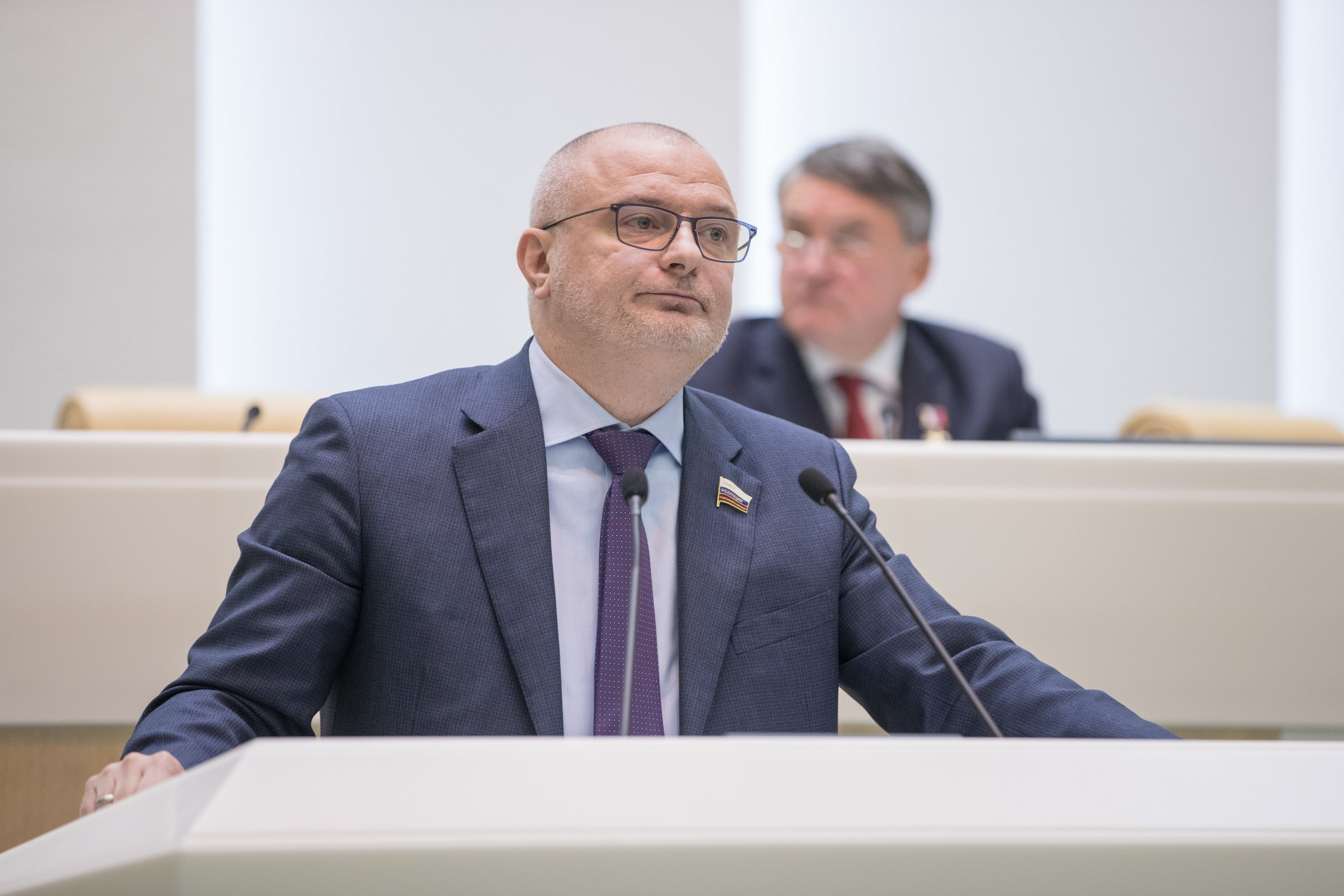 Клишас, Андрей Александрович